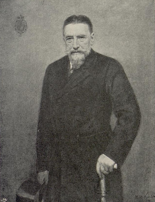 Max Koner: Portrait Karl Fürst von Lichnowsky (1819–1901), 1896 (Карл Ліхновський / en: Karl, Prince Lichnowsky / cs: Karel Maria Lichnovský z Voštic (1819–1901))